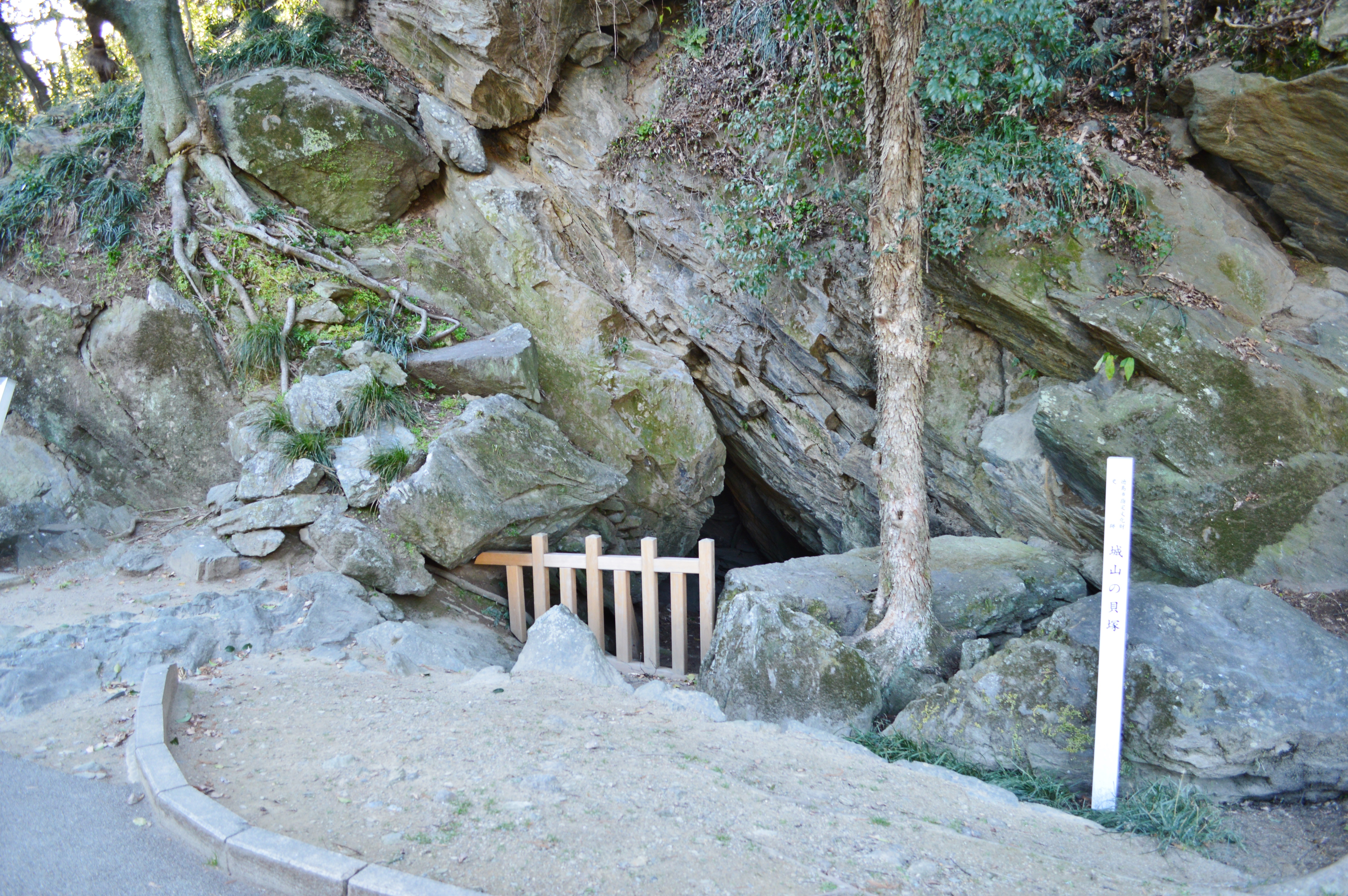 城山貝塚 (徳島市) 概観